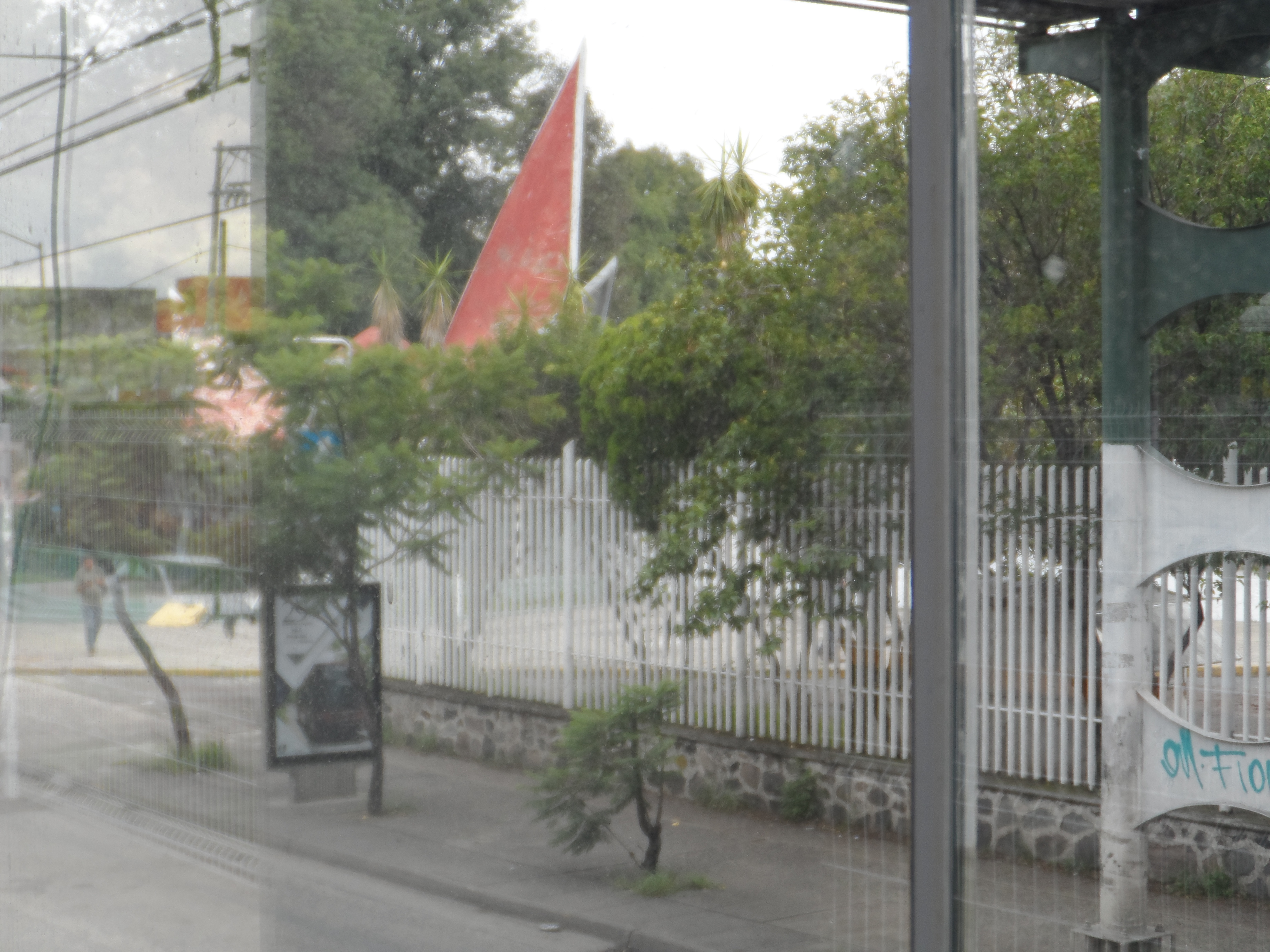 Entrada a la unidad deportiva "Adolfo López Mateos", inaugurada por dicho presidente de México en la ciudad de Guadalajara en 1964. La foto fue tomada desde la estación homónima de la Línea 1 del Tren Ligero.